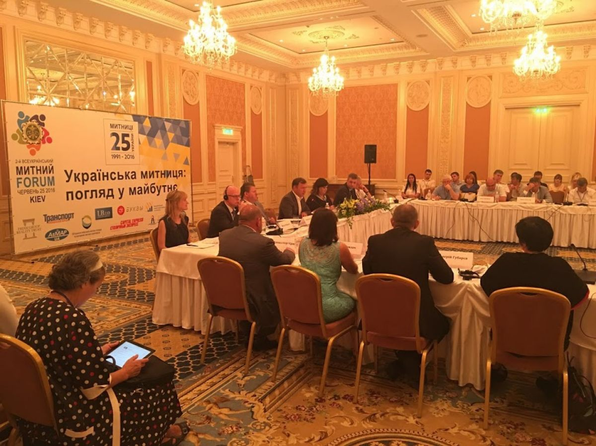 Всеукраинский таможенный форум